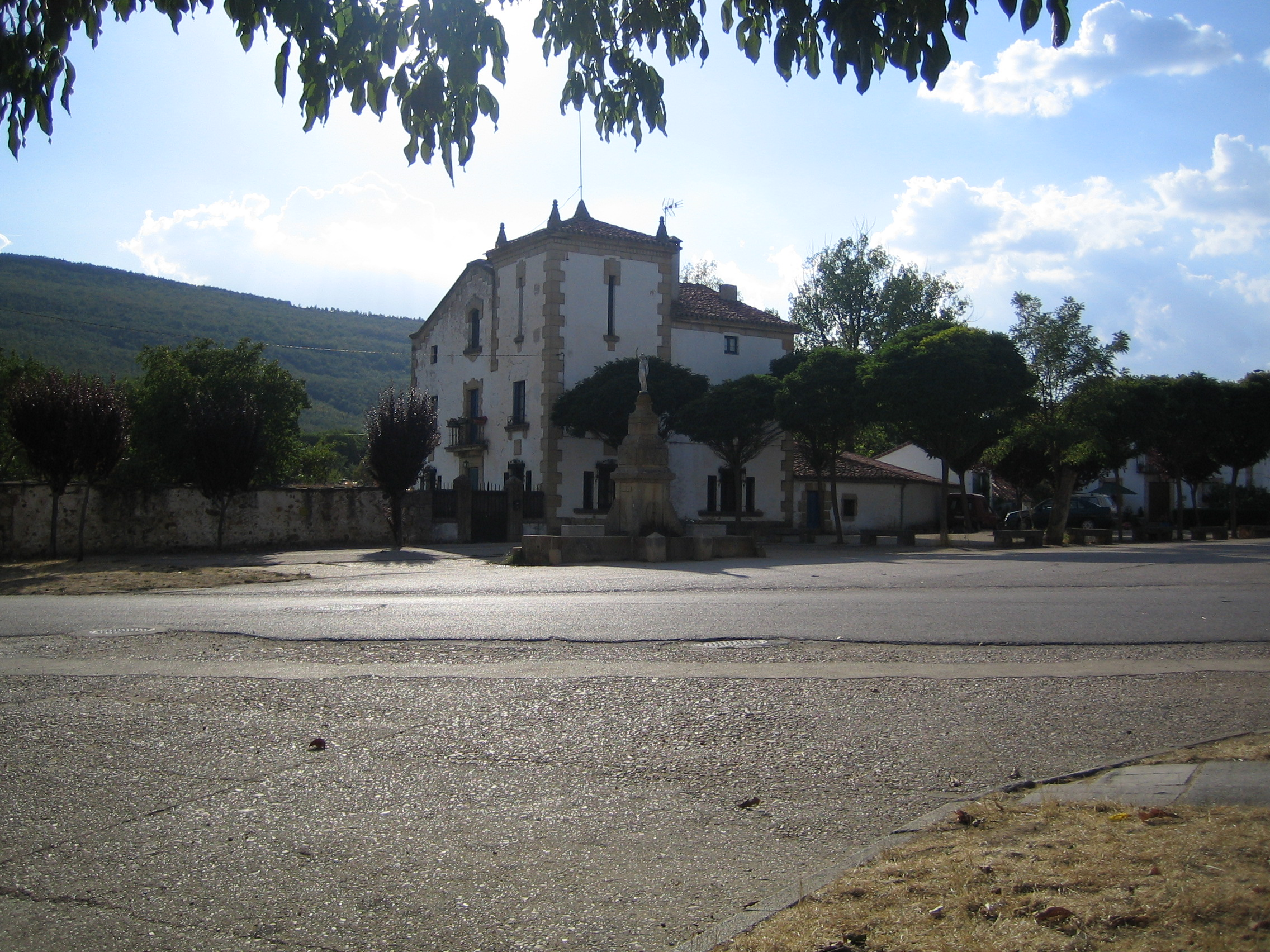 Sotillo, "Casa Azul", plaza de la Lastra